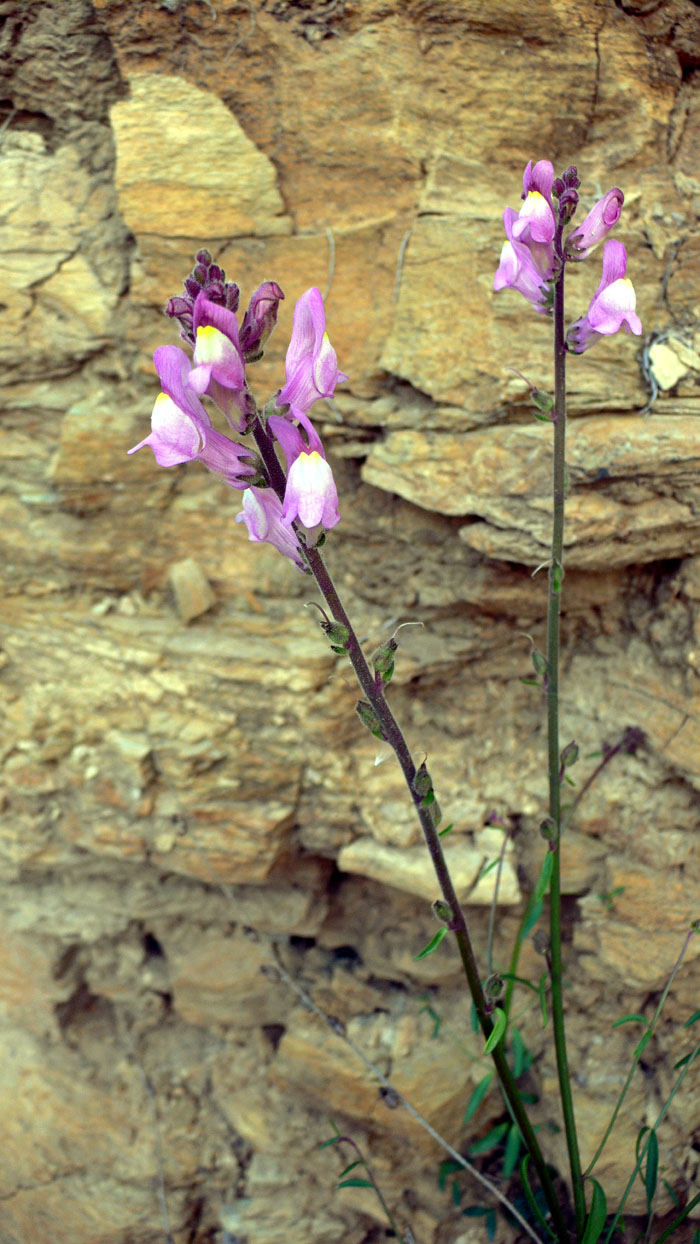 Antirrhinum barrelieri en el Parque Natural de la Sierra de la Muela en Cartagena (España)